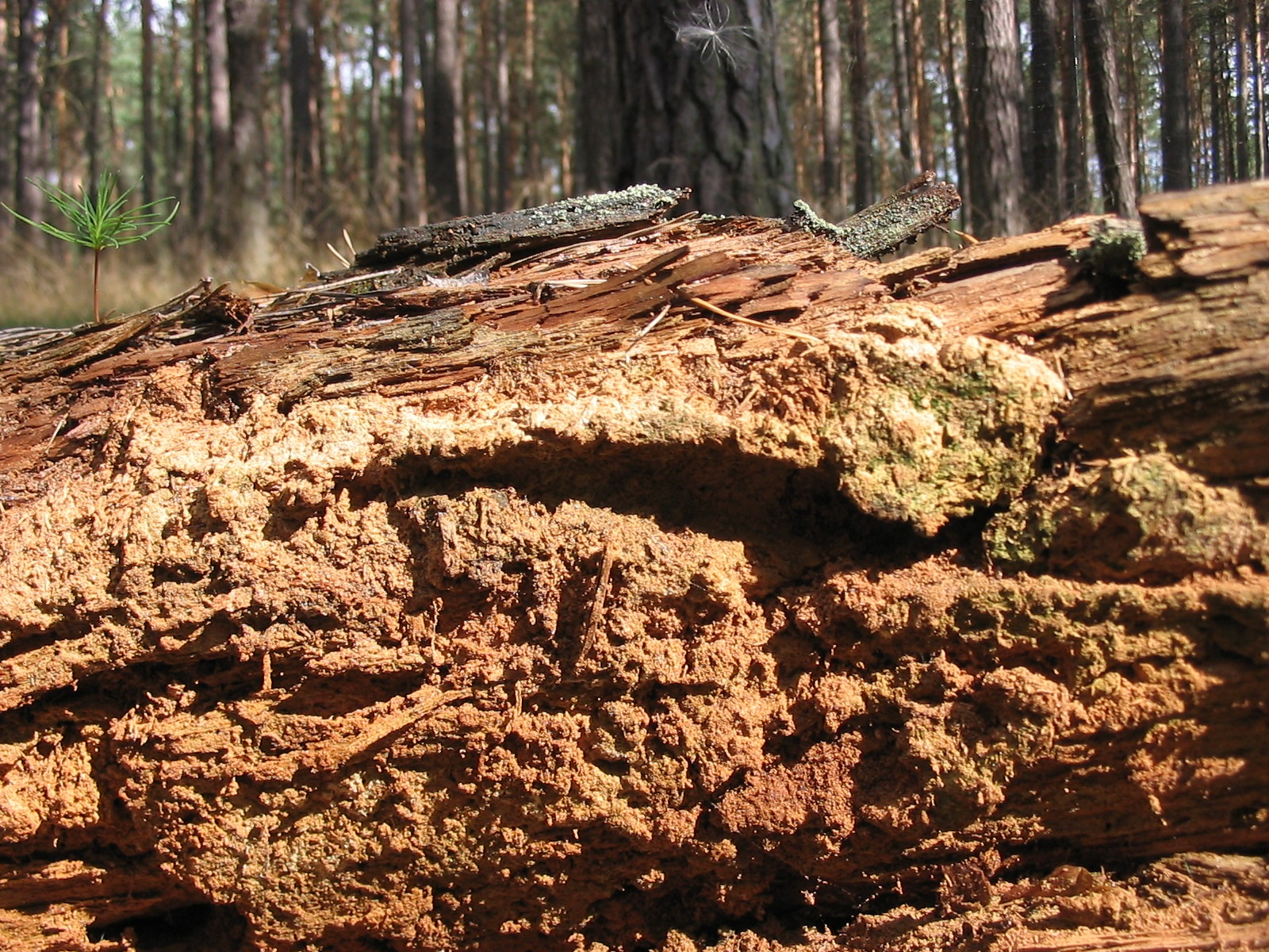 Totholz (Wald-KieferWald-Kiefer) in BrandenburgBrandenburg Am linken Bildrand ist ein Kiefern-Sämling auf der vermodernden Kiefer zu sehen. siehe auch: Totholzverjüngung|Totholzverjüngung (auch Rannenverjüngung oder Kadaververjüngung) Naturpark Nuthe-Nieplitz, Weg Dobbrikow-Wittbrietzen Selbst fotografiert, August 2004